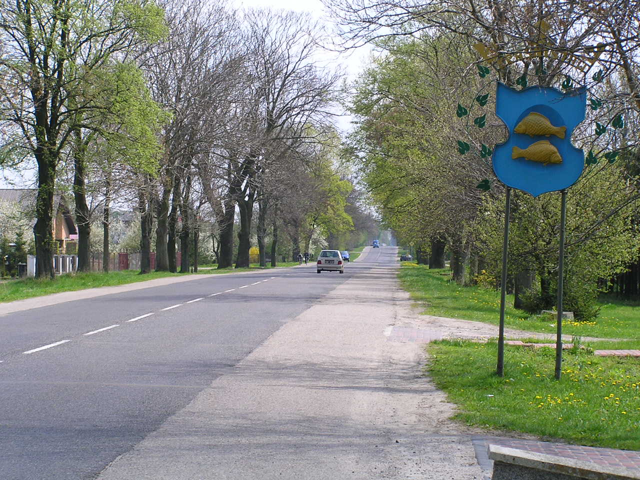 autor: Yarek shalom 22:01, 25 October 2006 (UTC)yarek shalom yhuhuh